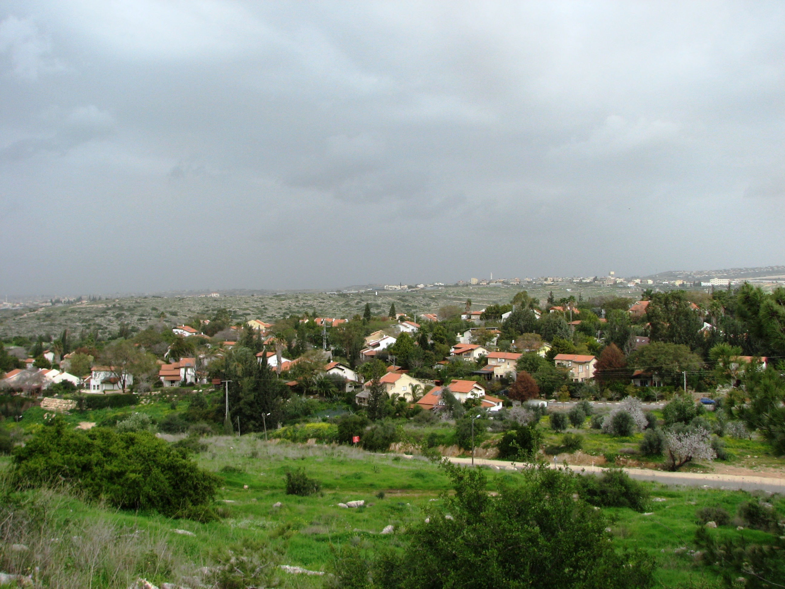 Nirit is a communal settlement in central Israel. נירית הוא יישוב קהילתי באזור השרון, ליד היישוב מתן ויער חורשים